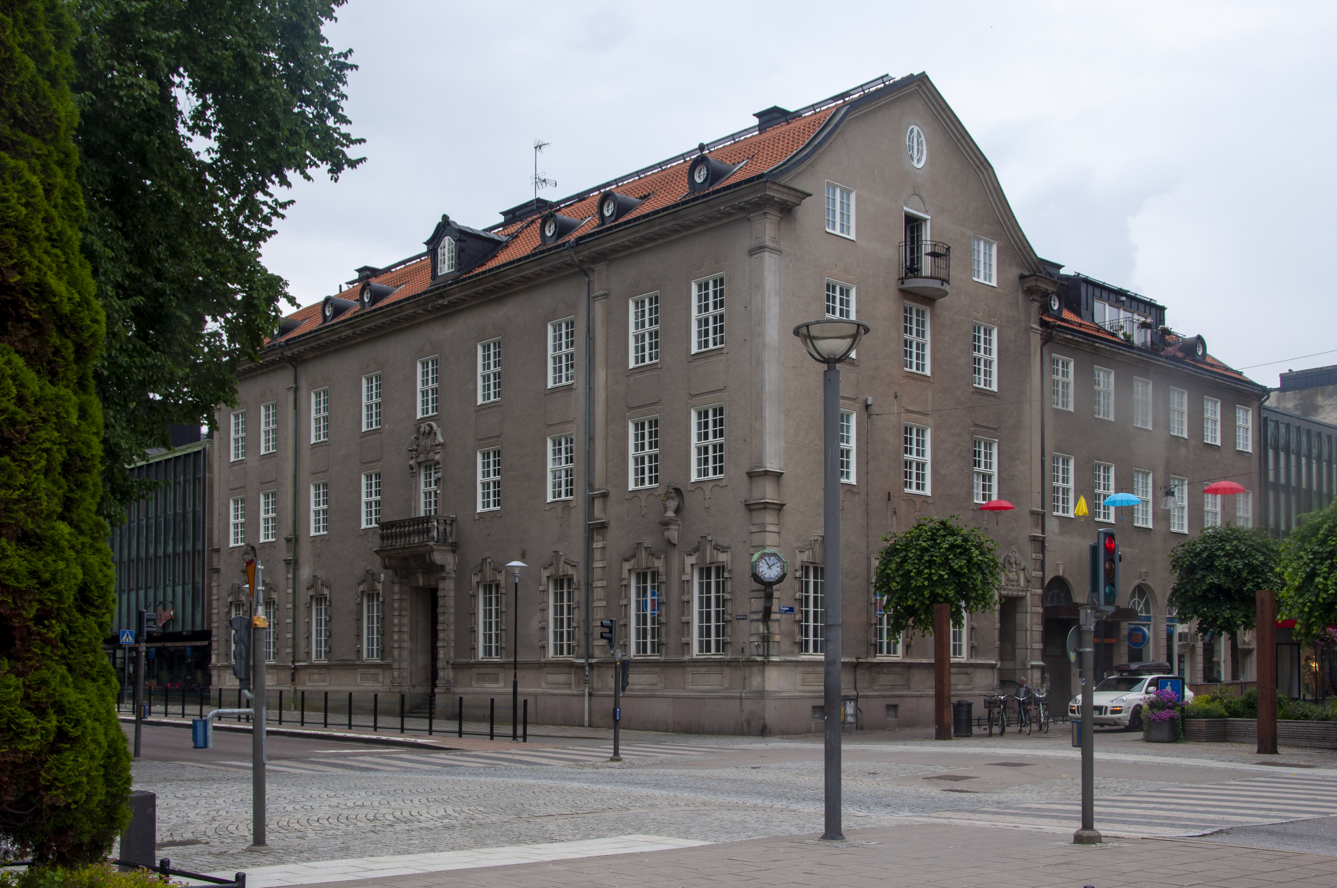 Näckrosen 1, Edsgatan 27 - Kungsgatan 11. Byggherre: Enskilda banken i Vänersborg, Byggår: 1919–1922, Arkitekt: Ivar Tengbom